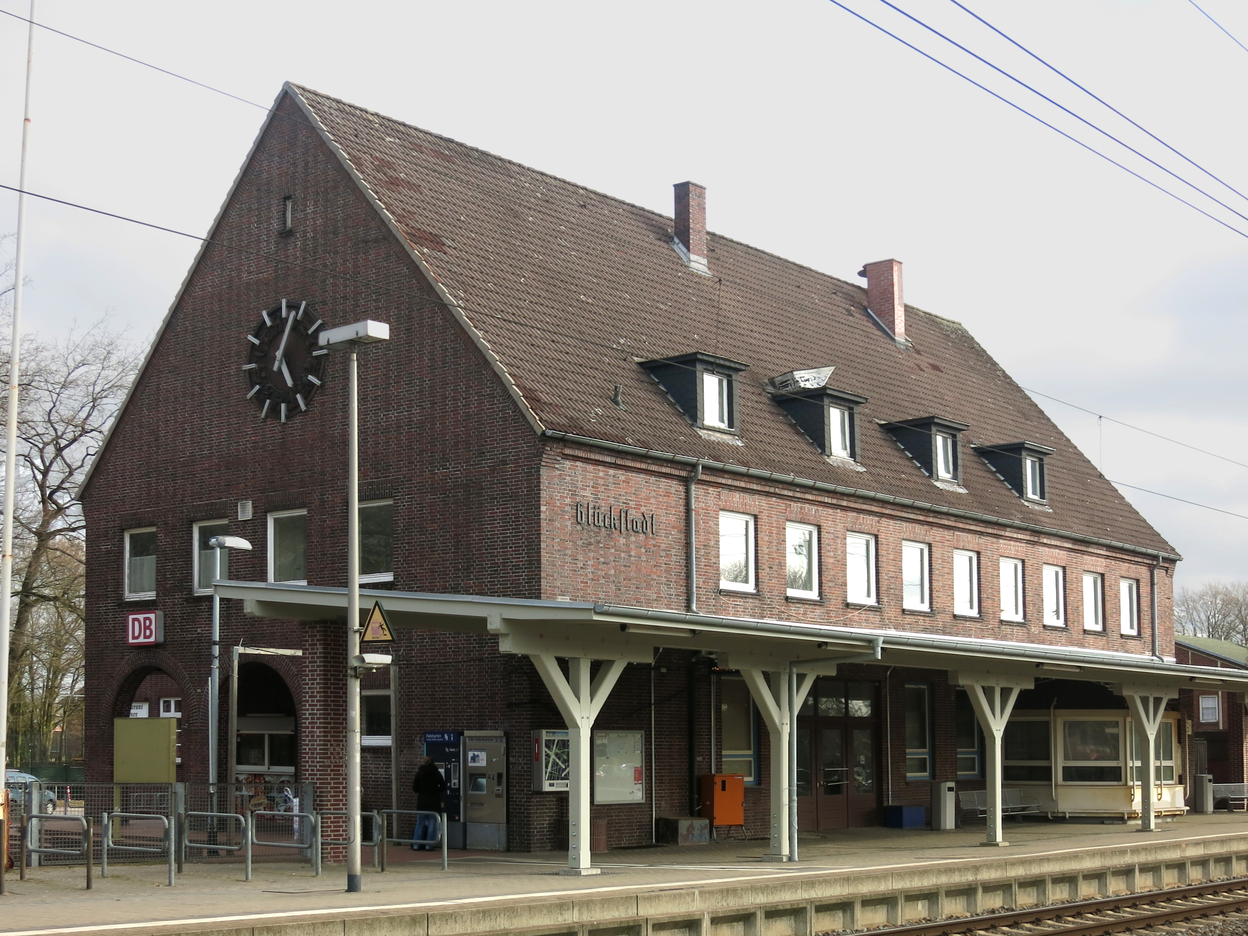 Bahnhofsgebäude Glückstadt 2019